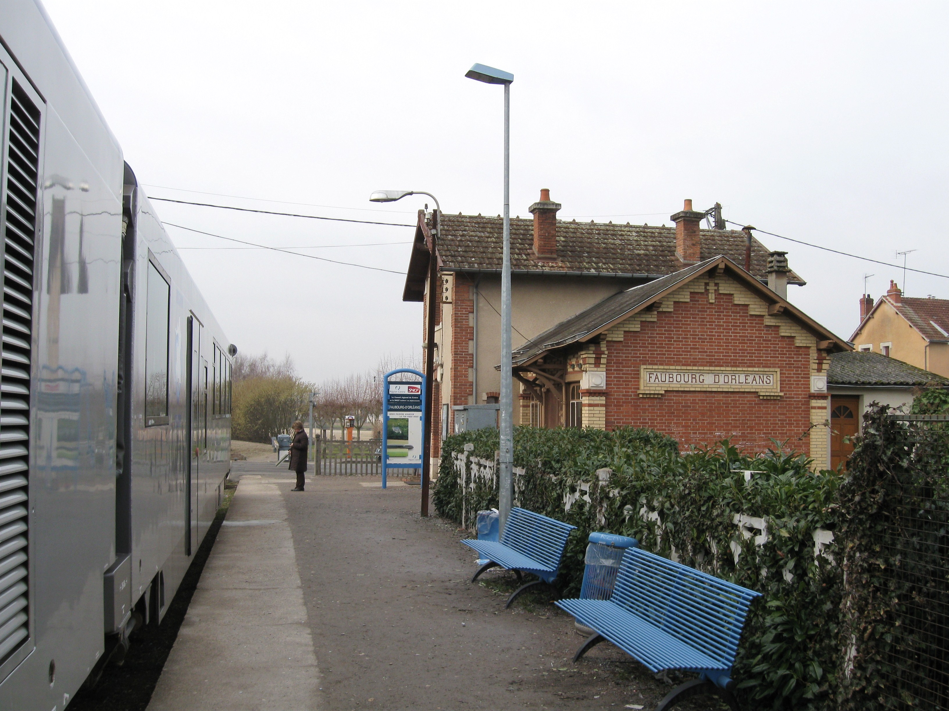 Gare du Faubourg-d'Orléans, Romorantin-Lanthenay, Loir-et-Cher, France